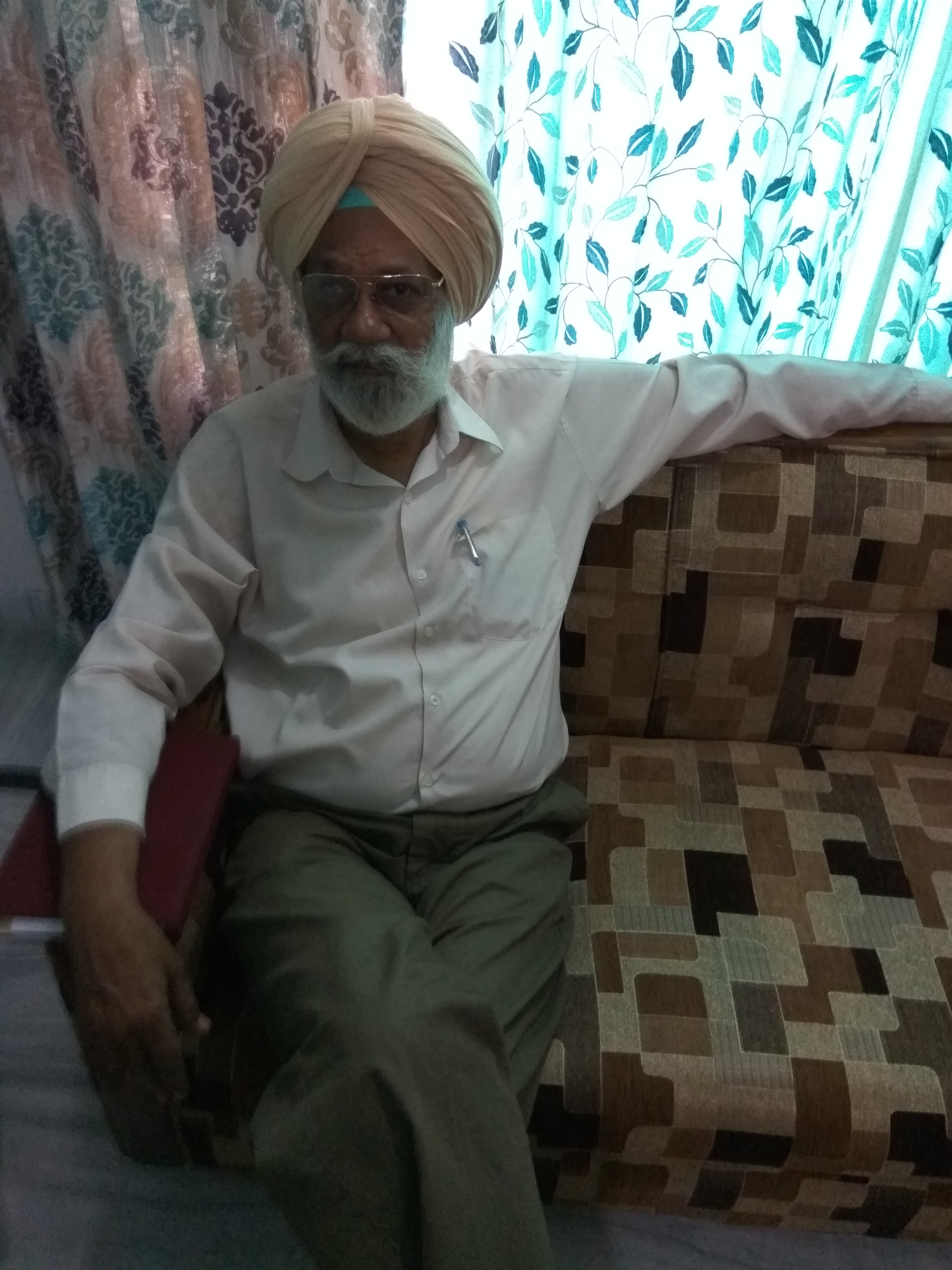 ਪਟਿਆਲੇ ਤੋਂ ਪੰਜਾਬੀ ਲੇਖਕ ਉਜਾਗਰ ਸਿੰਘ